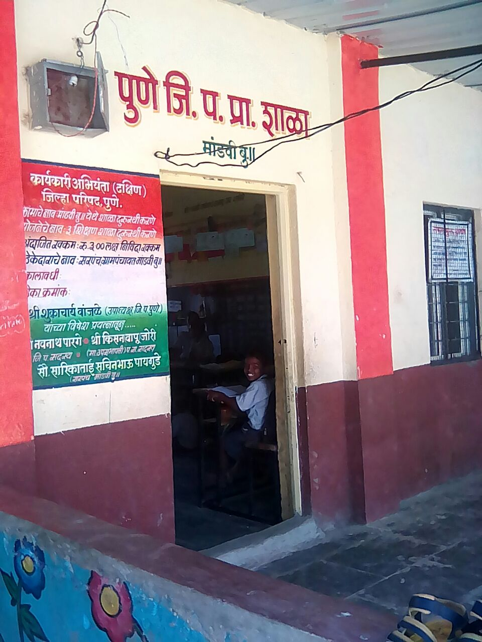 प्राथमिक शाळा मांडवी बु.